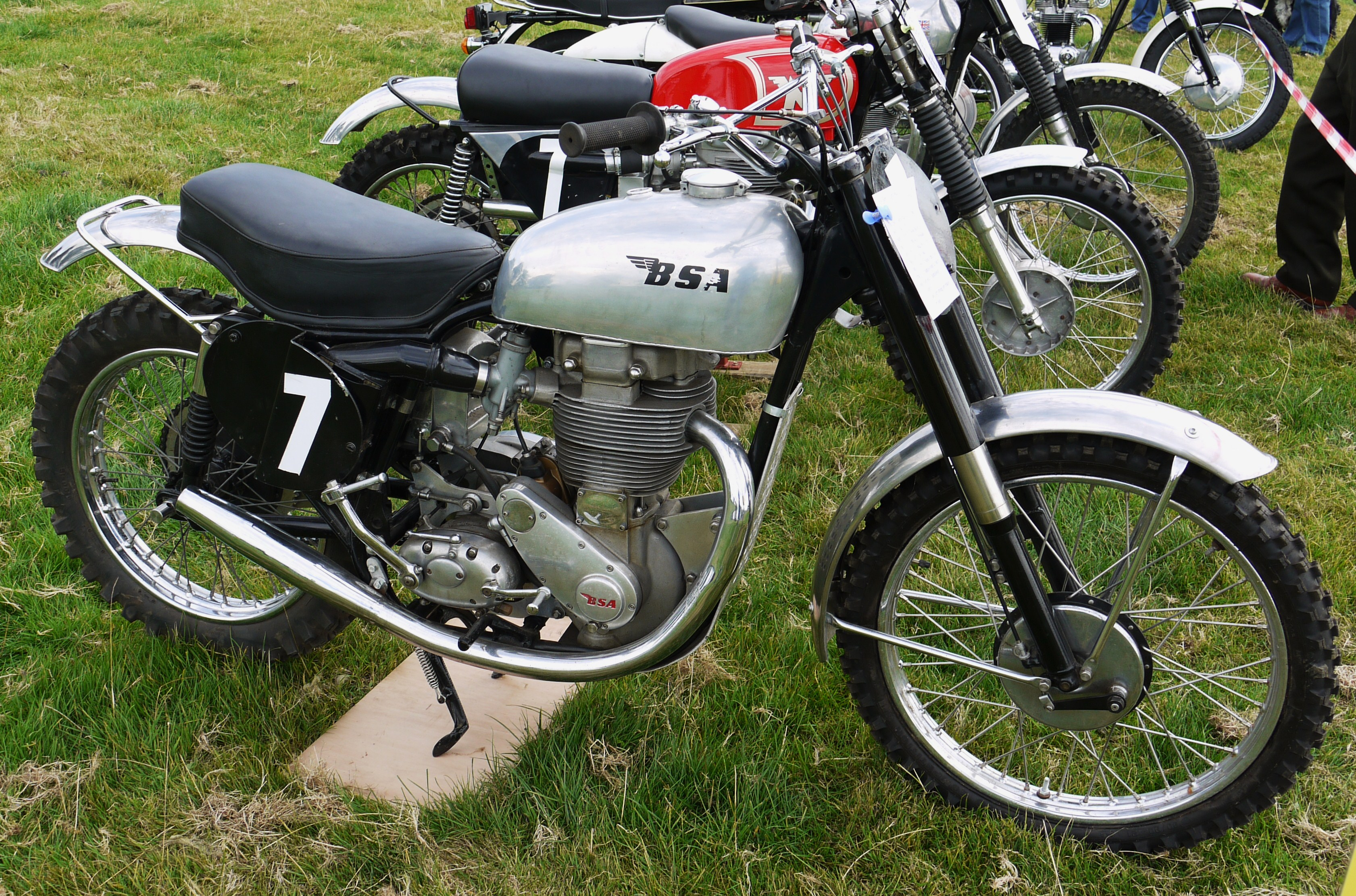 Panasonic G1